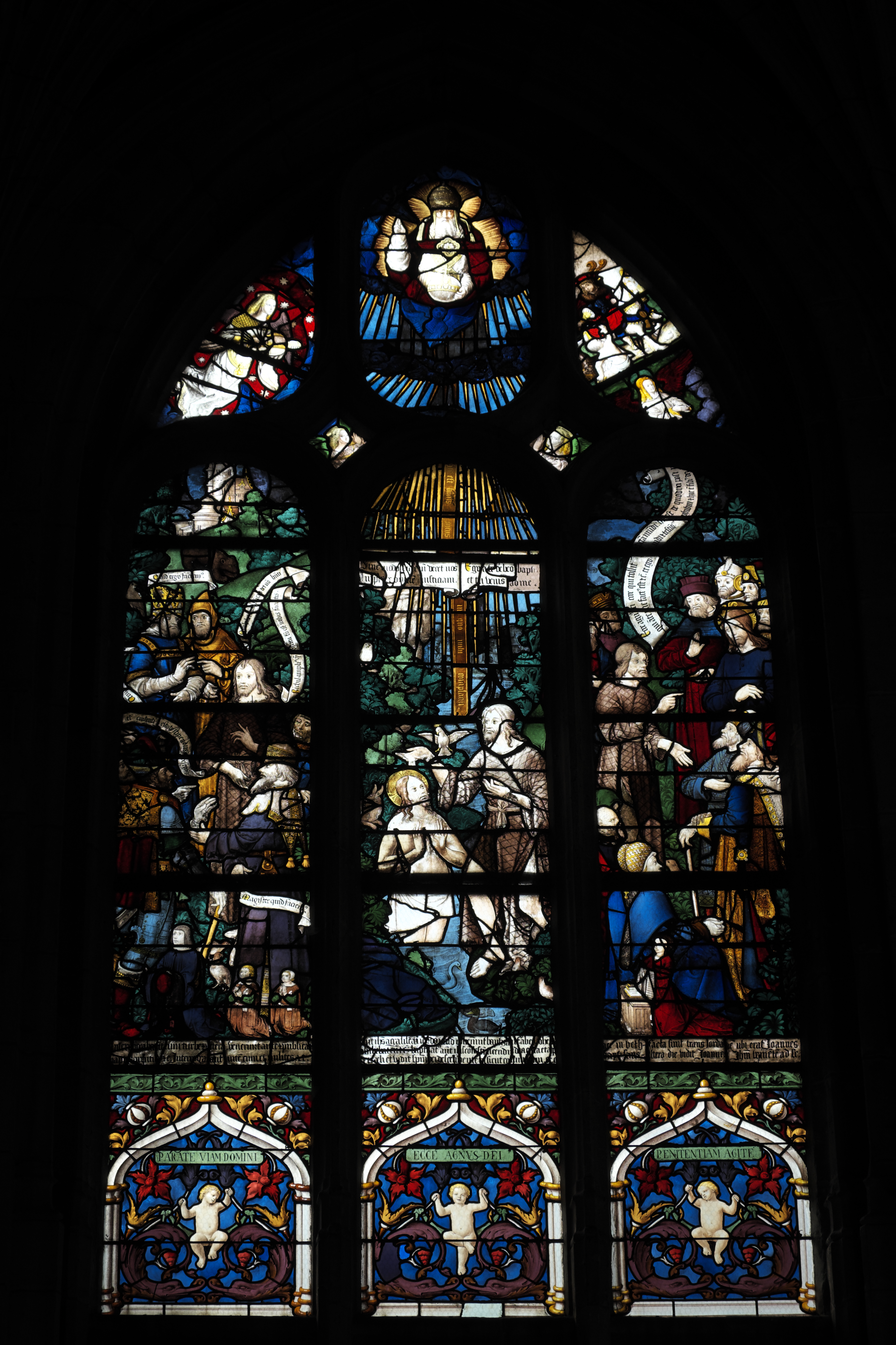 Katholische Kirche Sainte-Foy in Conches-en-Ouche im Département Eure (Haute-Normandie/Frankreich), Bleiglasfenster aus der 1. Hälfte des 16. Jahrhunderts; Darstellung: Szenen aus dem Leben von Johannes dem Täufer, in der Mitte: Taufe Jesu